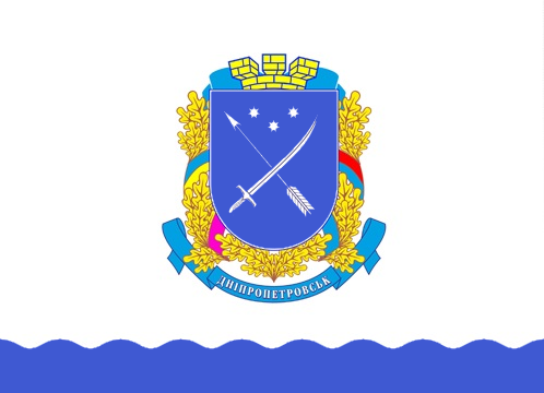 Флаг Днепра